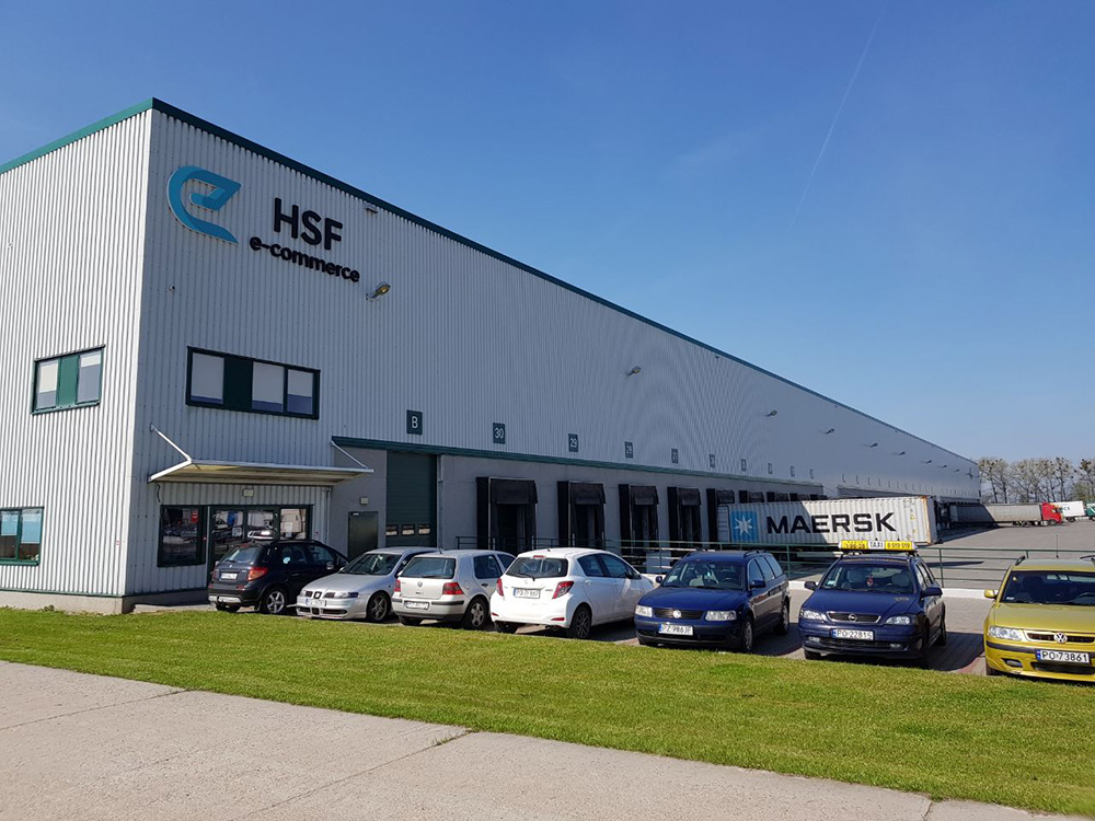 Zentrallager in Sady bei Poznań